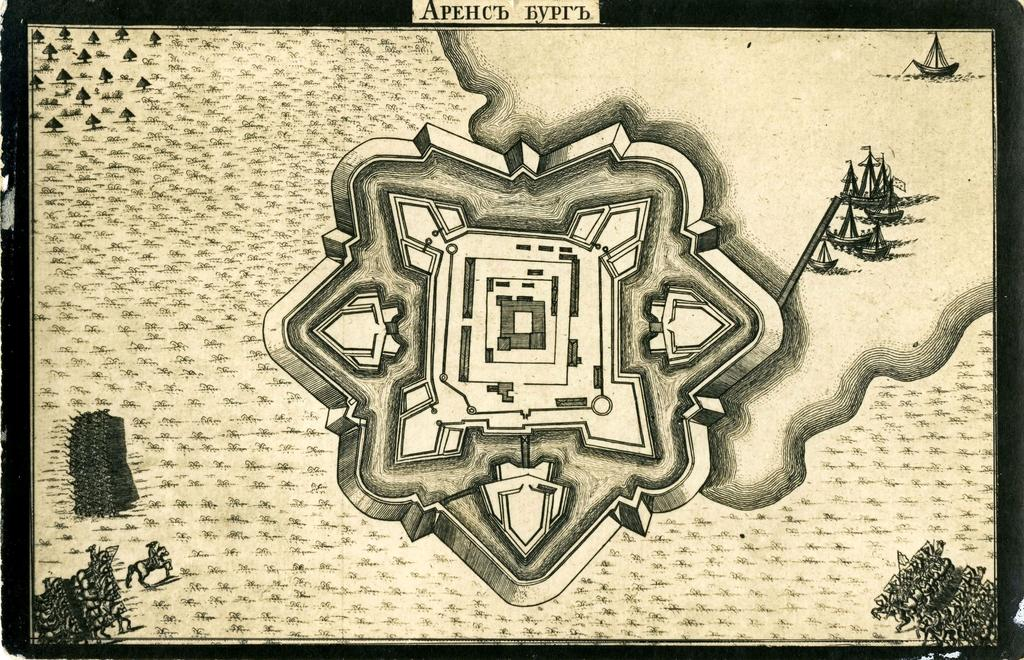 Kuressaare linnus, kindluse plaan 1710. aastast fotopostkaart